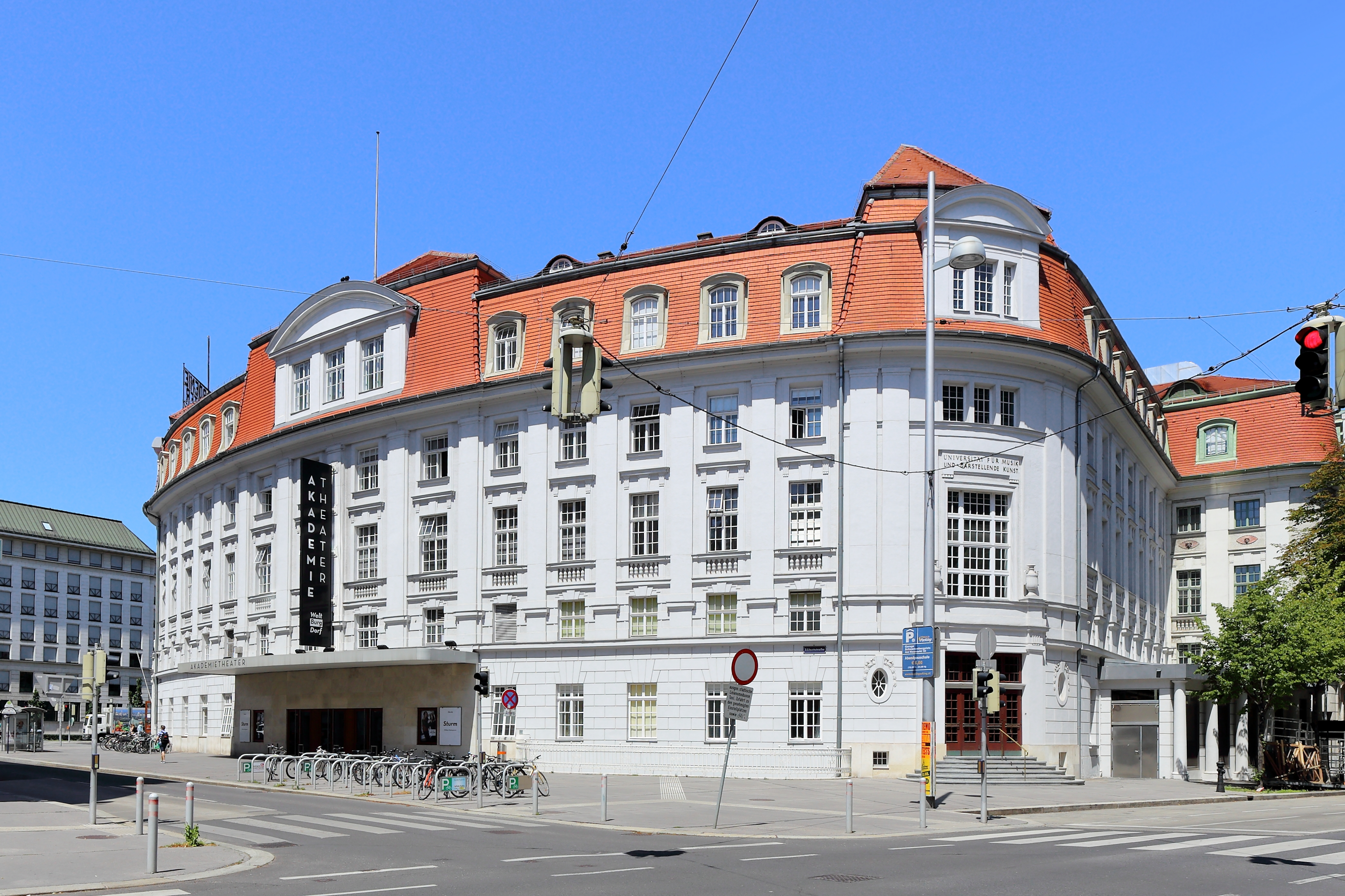 Südansicht des Akademietheaters im 3. Wiener Gemeindebezirk Landstraße.Das Akademietheater wurde ursprünglich als Übungsbühne für die „Akademie für Musik und darstellende Kunst“ gemeinsam mit dem Konzerthaus nach Plänen der Architekten Ludwig Baumann, Fellner und Helmer im Auftrag der 1908 gegründeten Wiener Konzerthausgesellschaft von 1911 bis 1913 errichtet. Nach der Fertigstellung wurde es dem Staat übergeben, der sich bei der Errichtung finanziell beteiligte. Die Eröffnung des Schultheaters der Opernschule erfolgte am 4. Februar 1914 mit Giuseppe Verdis Ein Maskenball und die der Schauspielschule am 13. Februar 1914 mit dem Fragment Der Moloch von Hebbel. Seit 8. September 1922 dient es dem Burgtheater als Zweigstelle.